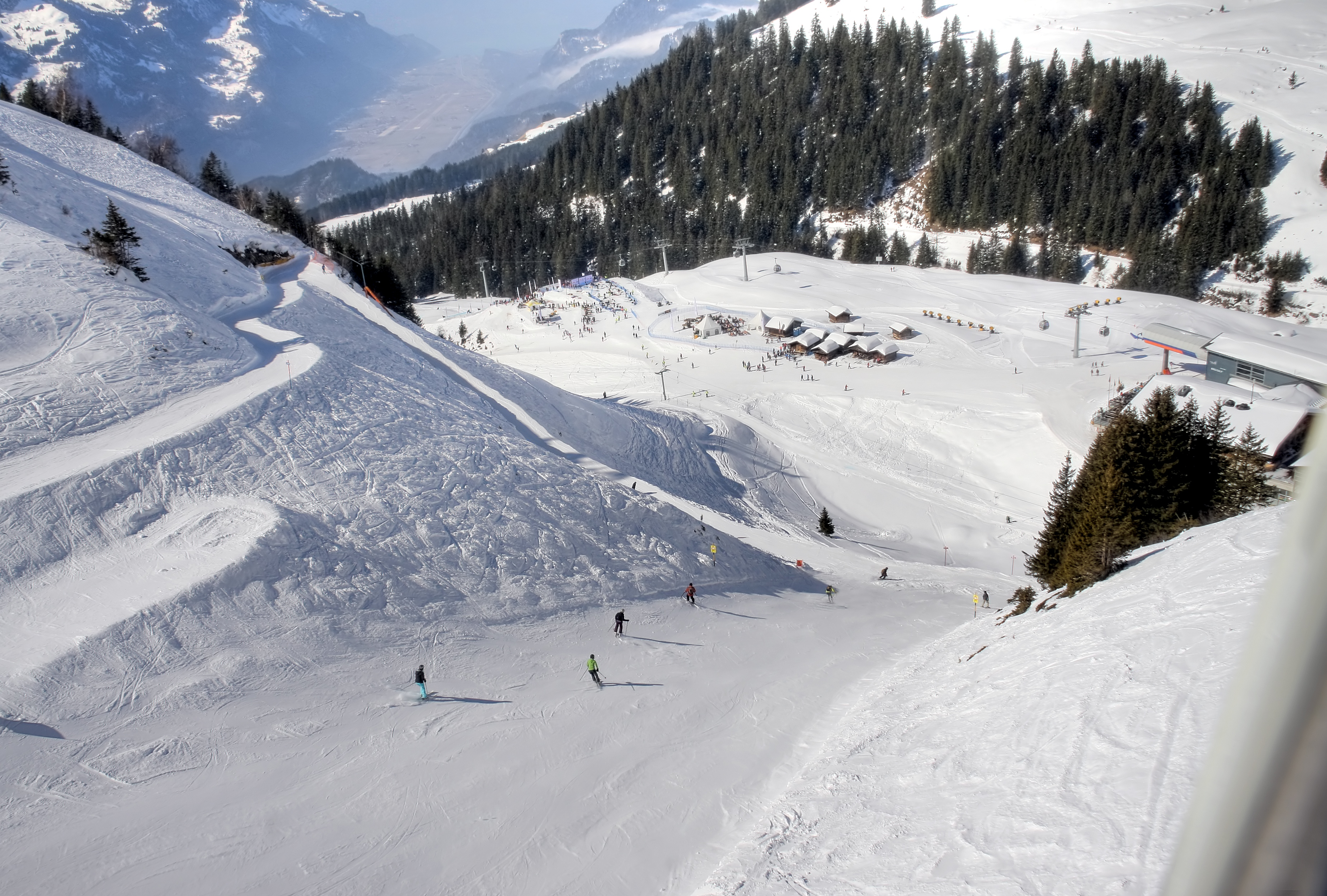 Skiabfahrt vom Planplatten zur Bergstation Mägisalp (rechts im Bild). Fotografiert aus einer Gondel des Eagle-Express. Links oben im Tal ist ein Militärflughafen zu sehen